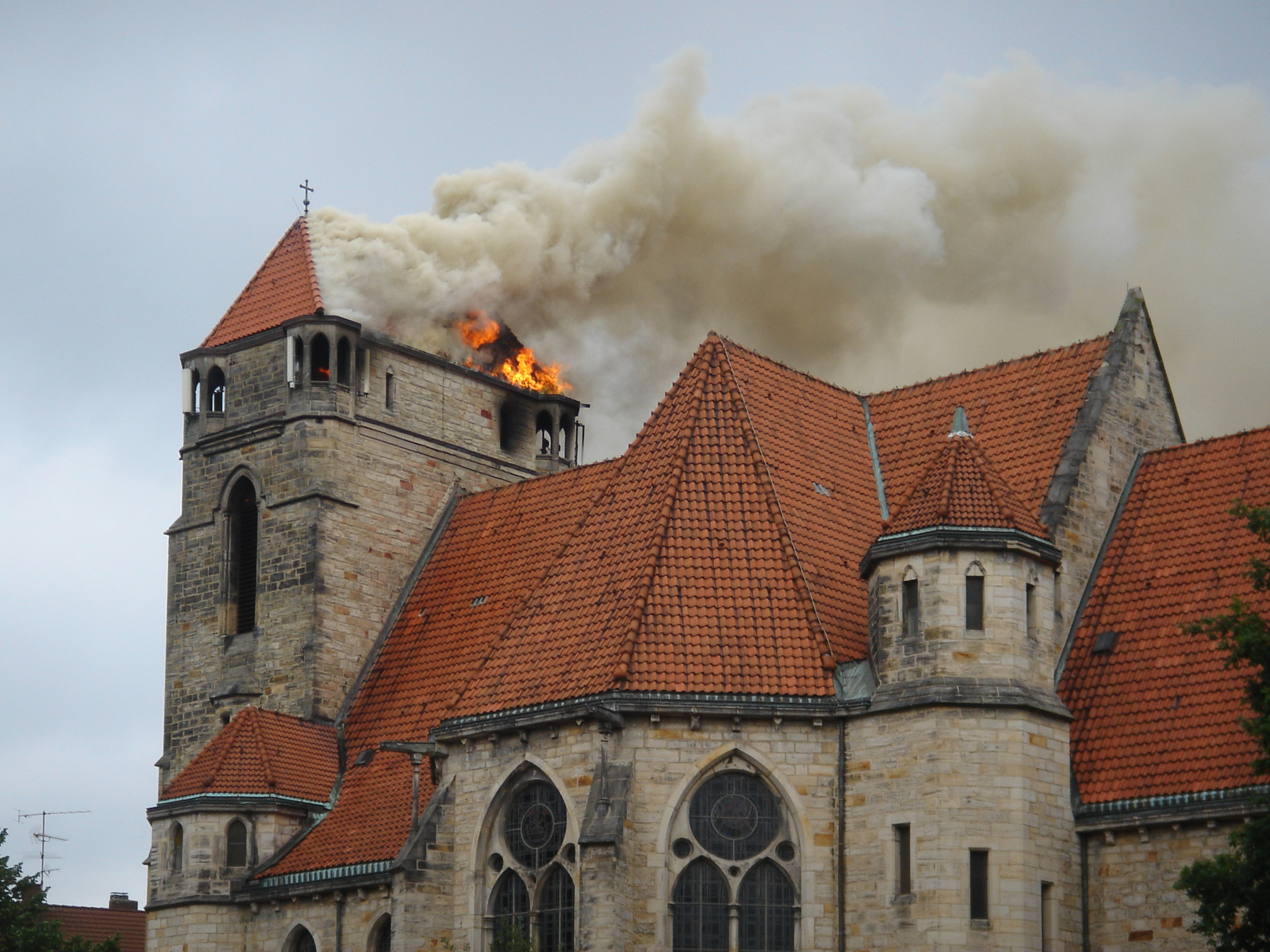 Kirchturmbrand der Lutherkirche in Hannover